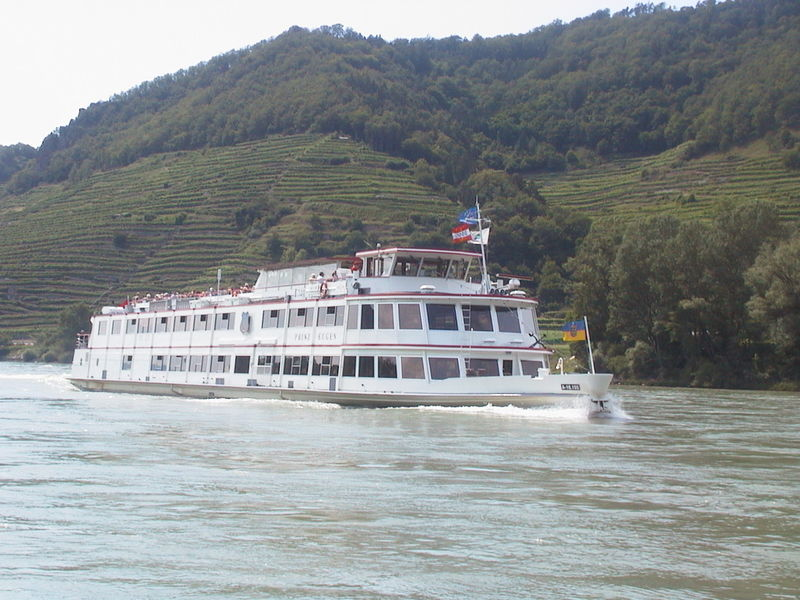 bateau d'excursion de la DDSG MS Prinz Eugen dans la Wachau, Autriche